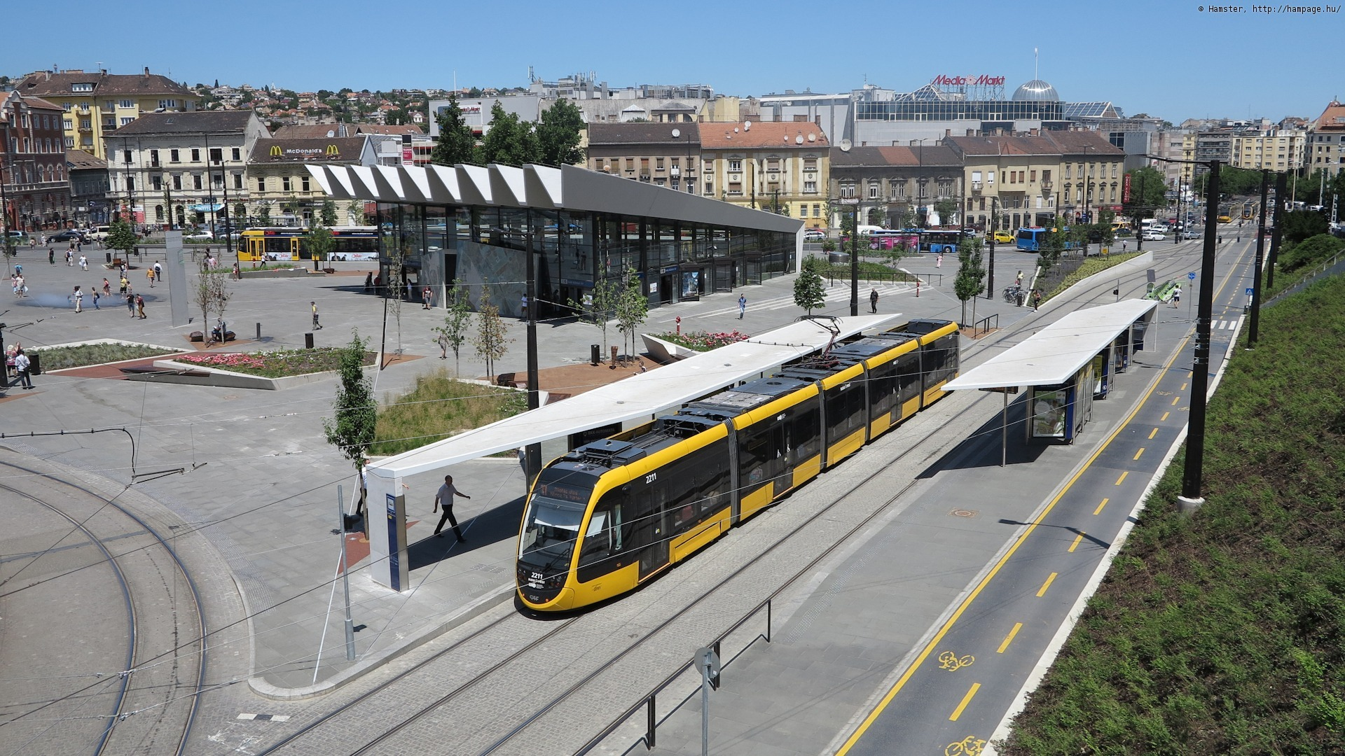 A 2211-es pályaszámú CAF Urbos 3 típusú villamos a Széll Kálmán téren